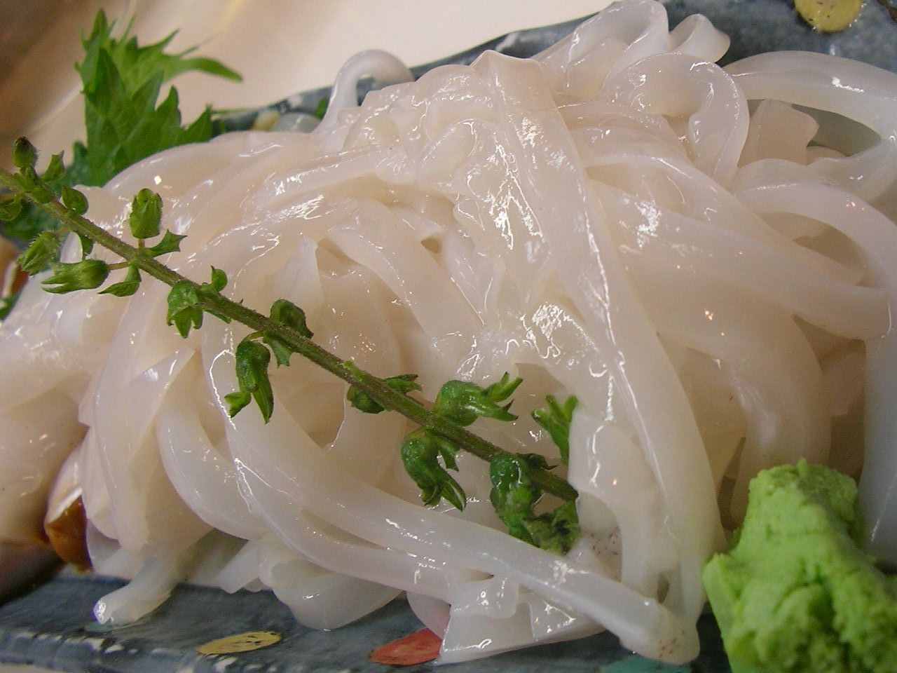 dinner at sakura izakaya